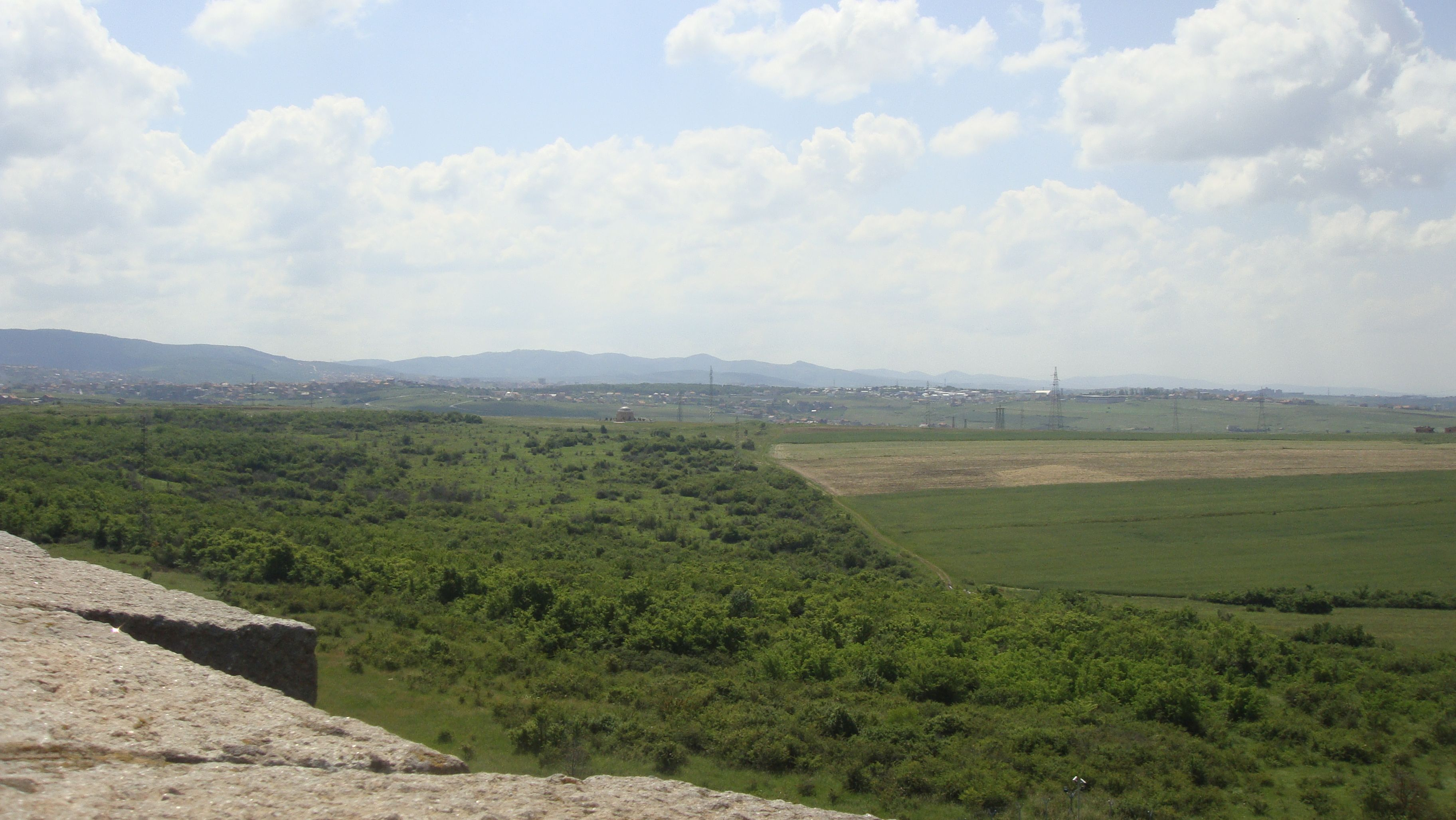 Srpskohrvatski / српскохрватски: Kosovo polje kod Prištine, poprište Kosovske bitke.